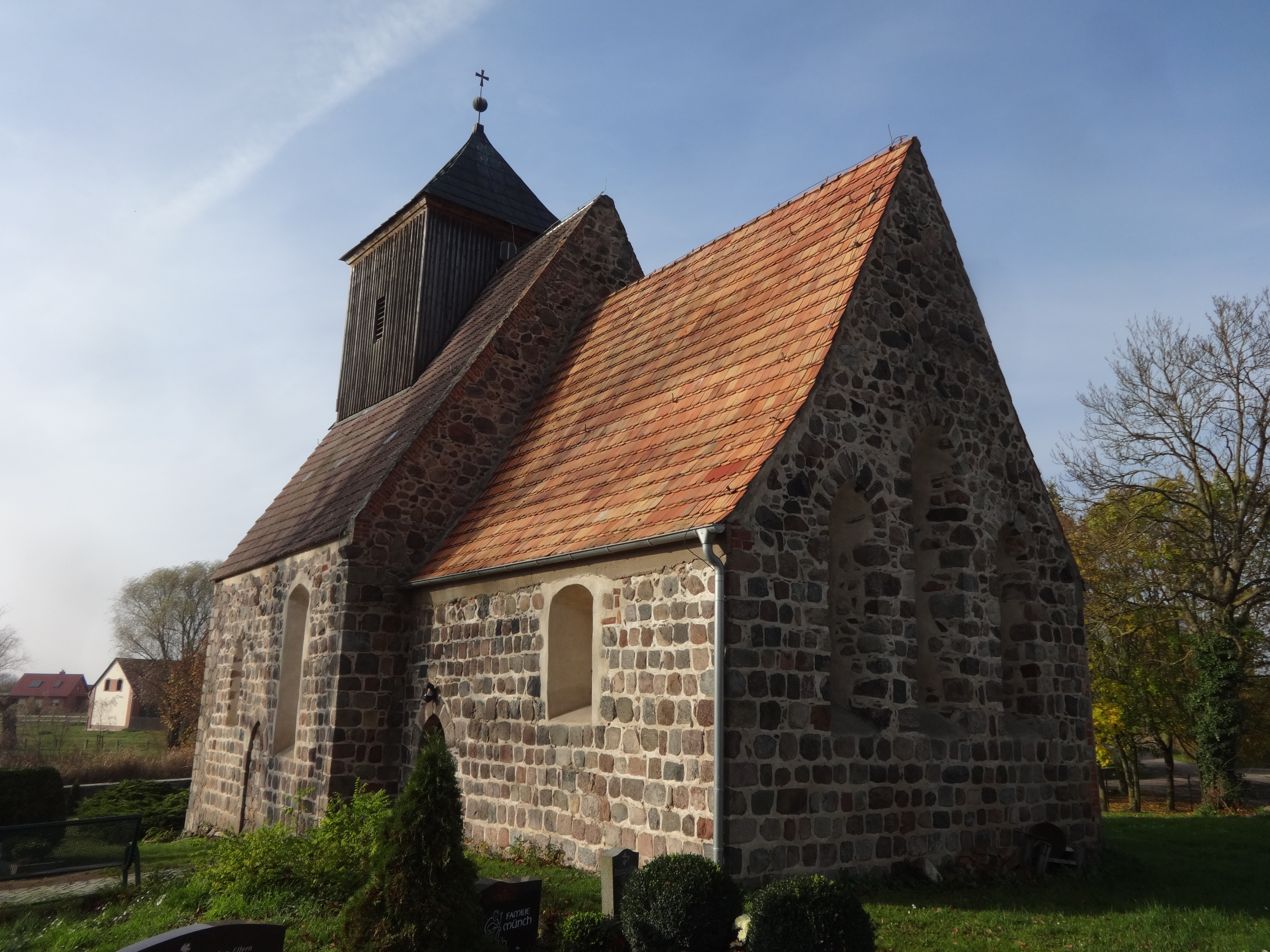 Die Dorfkirche in Münchehofe, einem Ortsteil der Gemeinde Müncheberg im Landkreis Oder-Spree, entstand in der zweiten Hälfte des 13. Jahrhunderts. Zu einem späteren Zeitpunkt kam der Westturm hinzu.